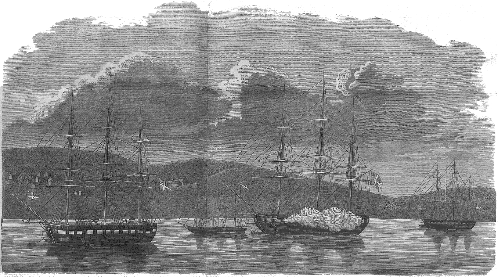 En norsk eskadre bestemt for Østersjøen på Hortens havn 18. april 1854, etter Krimkrigens utbrudd. Fra venstre fregatten «Freya«, skrue-dampkorvetten «Nidaros», fregatten «Desideria» og korvetten «Nordstjernen».